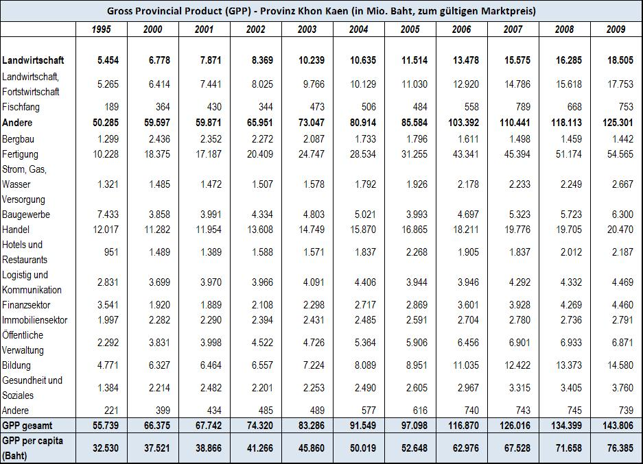 Gross Provincial Product (GPP) der Provinz Khon Kaen (in Mio. Baht, zum gültigen Marktpreis)